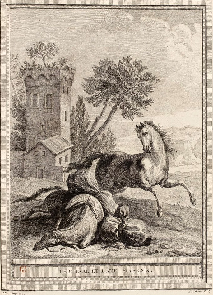 Gravure réalisée par Pierre Chenu d'après un dessin de Jean-Baptiste Oudry représentant la fable Le cheval et l'âne de Jean de La Fontaine (fable 16 du livre VI). Cette gravure est parue dans l'édition complète des fables de La Fontaine, parue en quatre tomes chez l'éditeur Desaint & Saillant, rue saint Jean de Beauvais à Paris, 1755-1759.